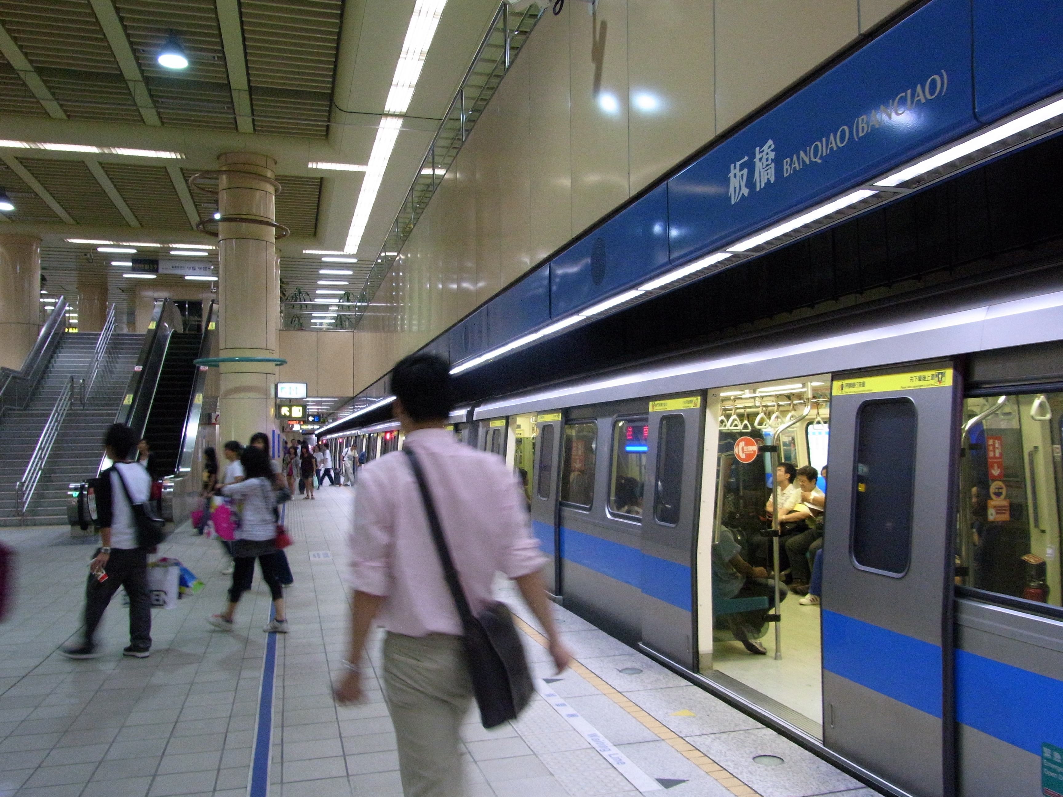 中文（台灣）: 台北捷運板橋站第一月台。